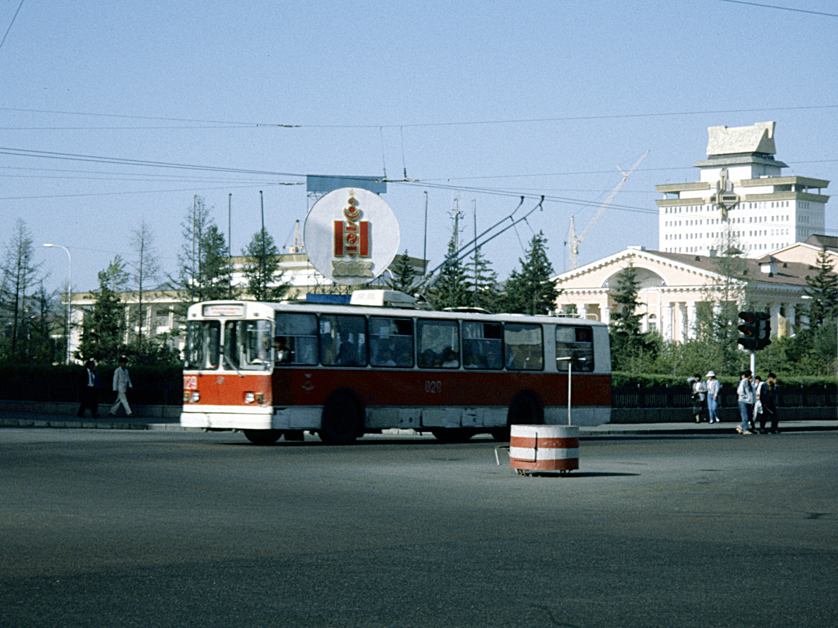 Stadtverkehr auf dem zentralen Sukhe Bator-Platz im Zentrum von Ulan Bator anno 1990